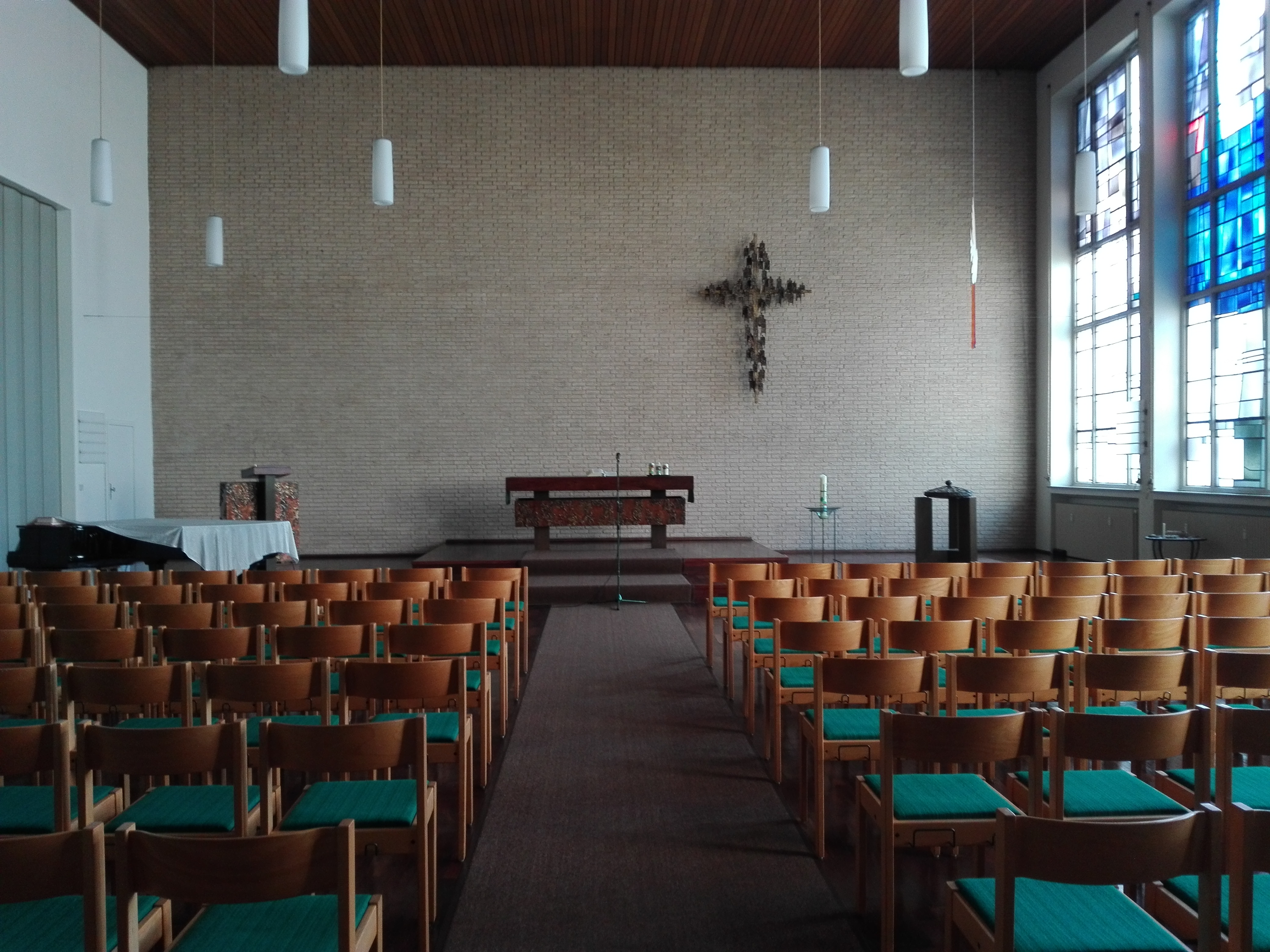 Rotter Kirche, Familiengottesdienst am 27. August 2017